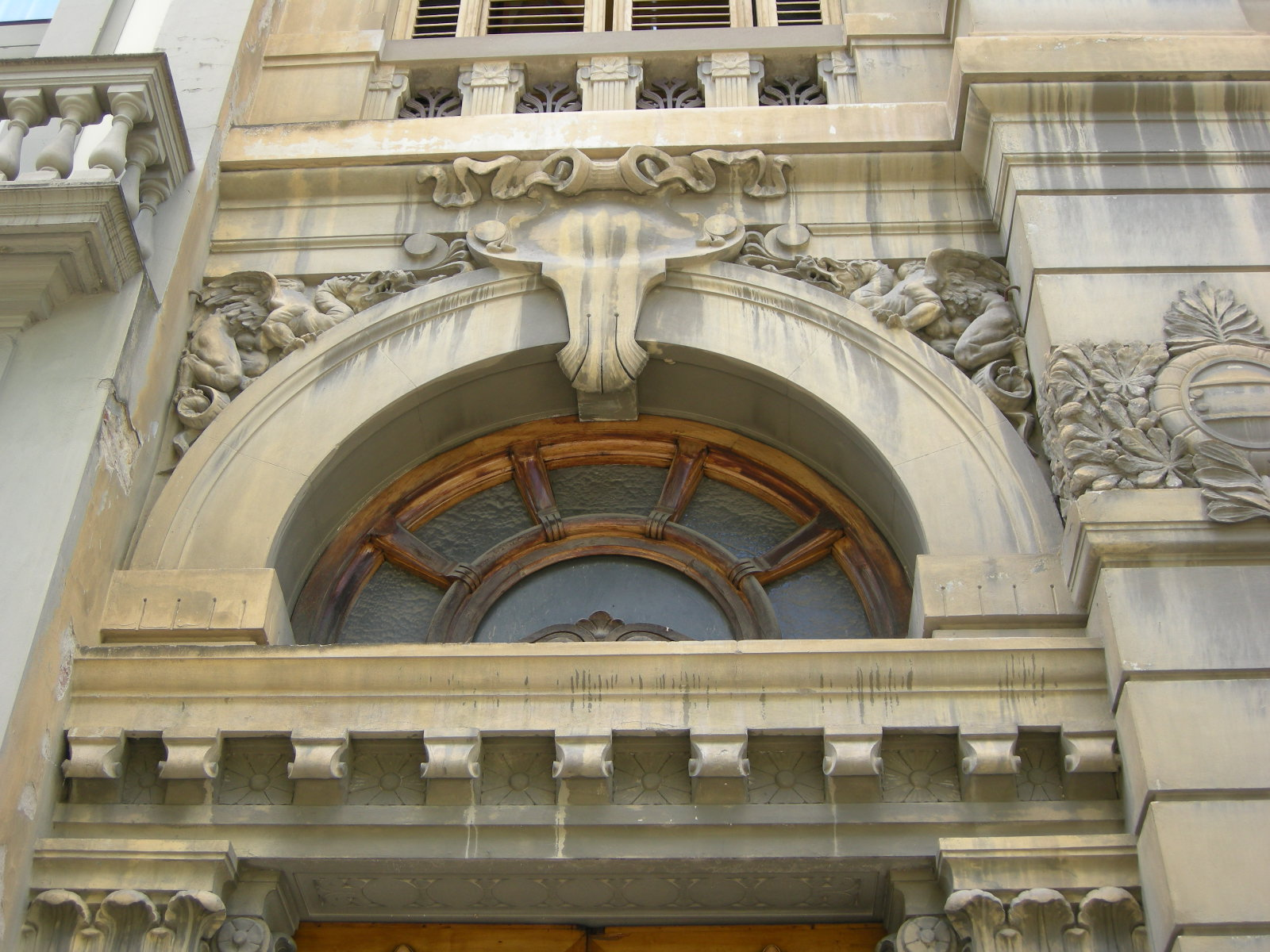 Villa uzielli